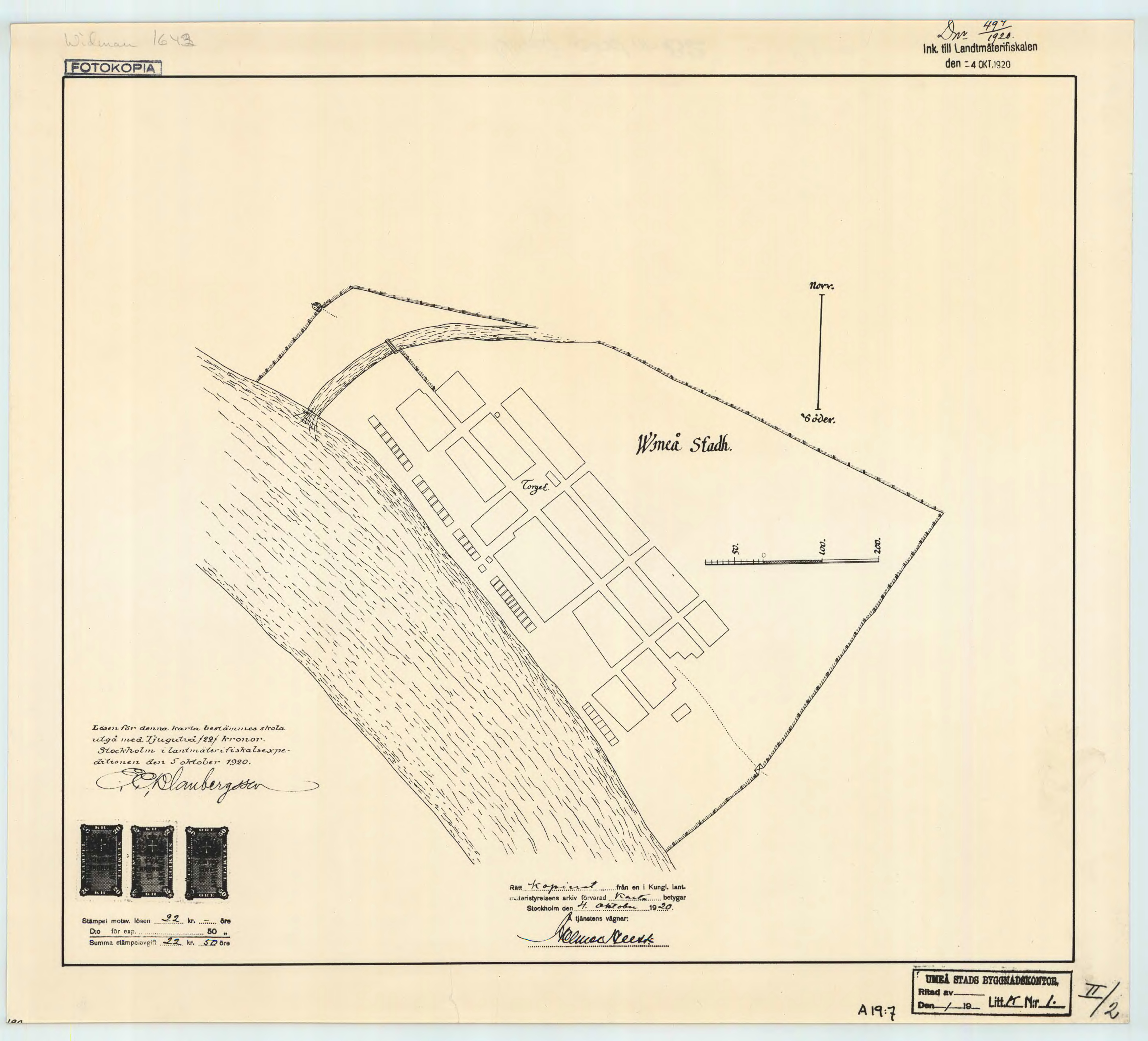 Fotokopia av: Wmeå Stadh